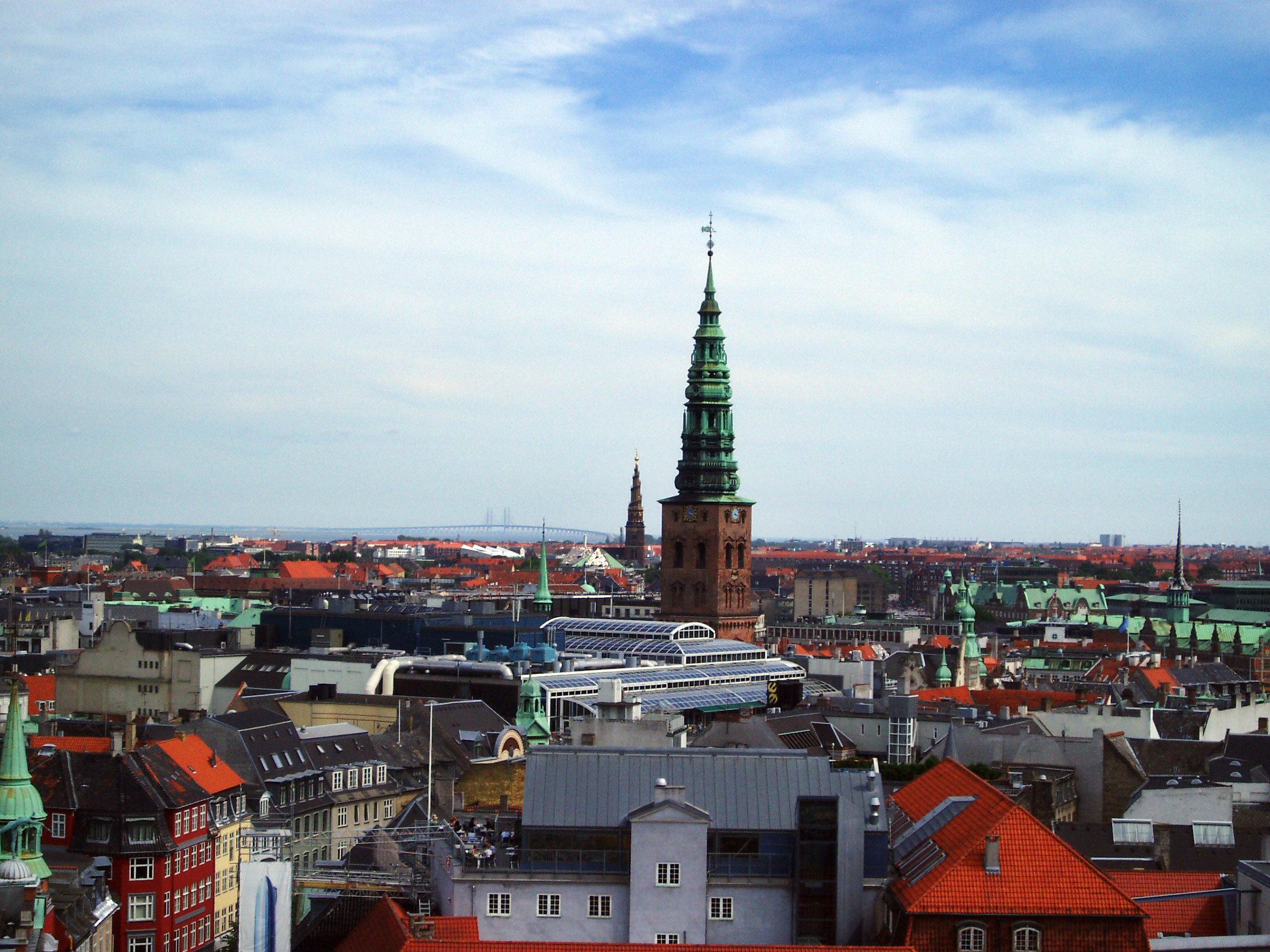 Köpenhamn